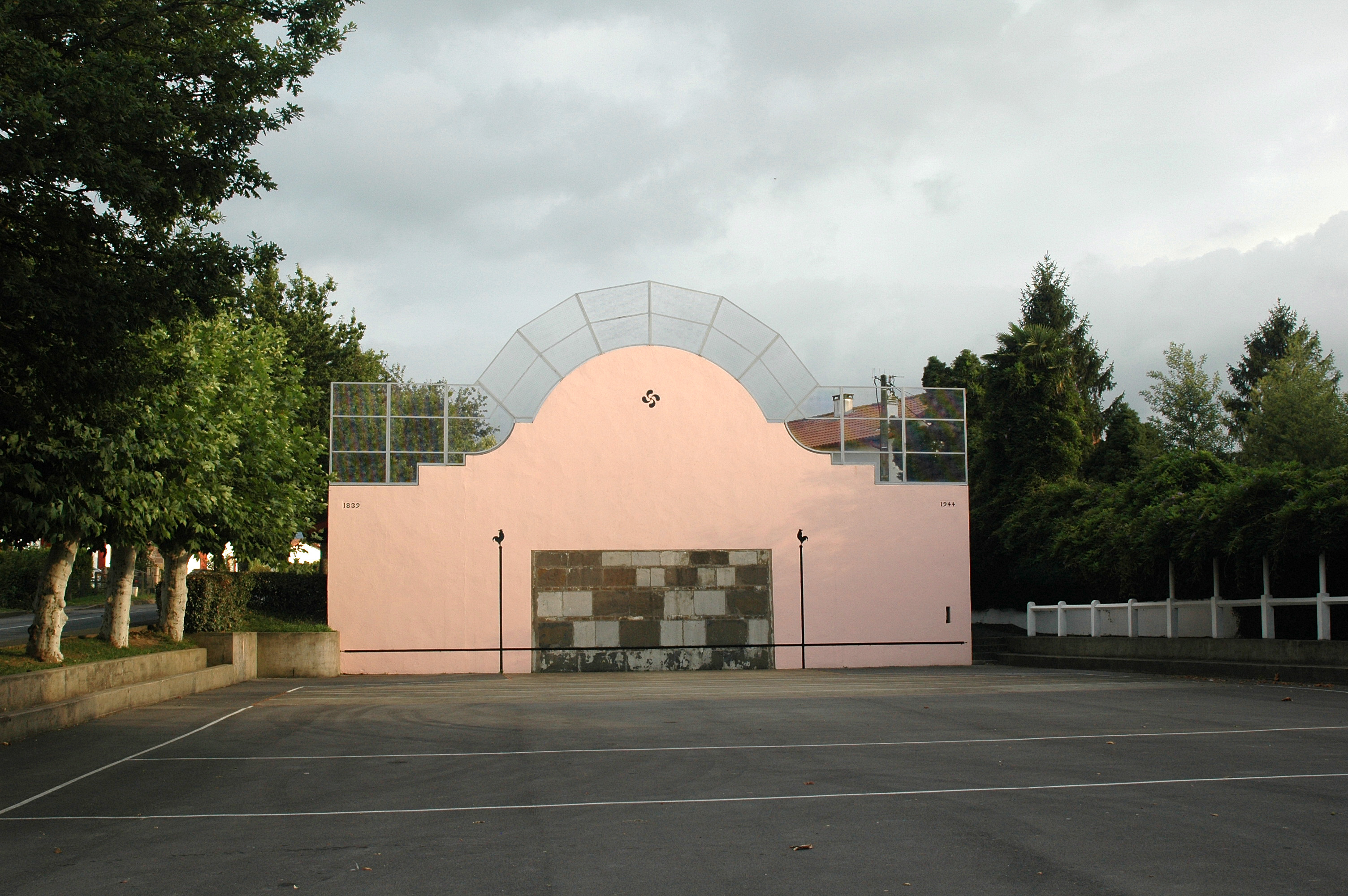 Larressore, le fronton. Photo prise le 08/08/06 par Harrieta171